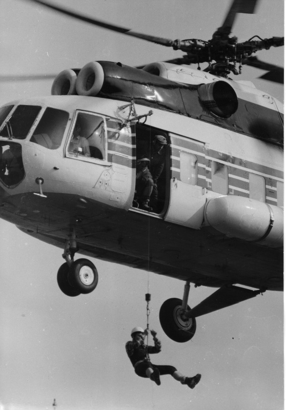 Záchranná akcia Mi-8 vo Vysokých Tatrách